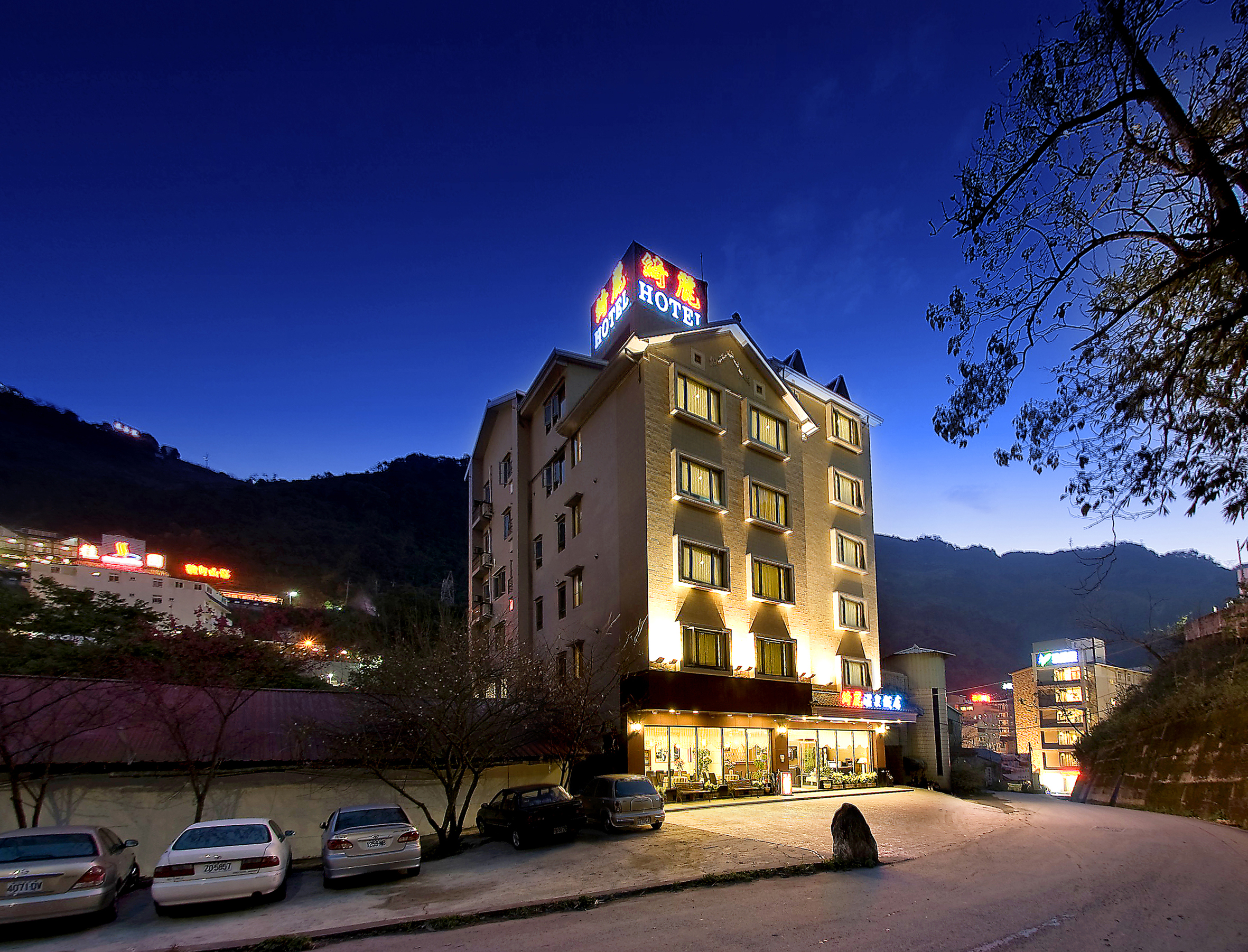 綺麗溫泉飯店，位於南投縣仁愛鄉精英村榮華巷8號，2008年9月因辛樂克颱風倒塌。